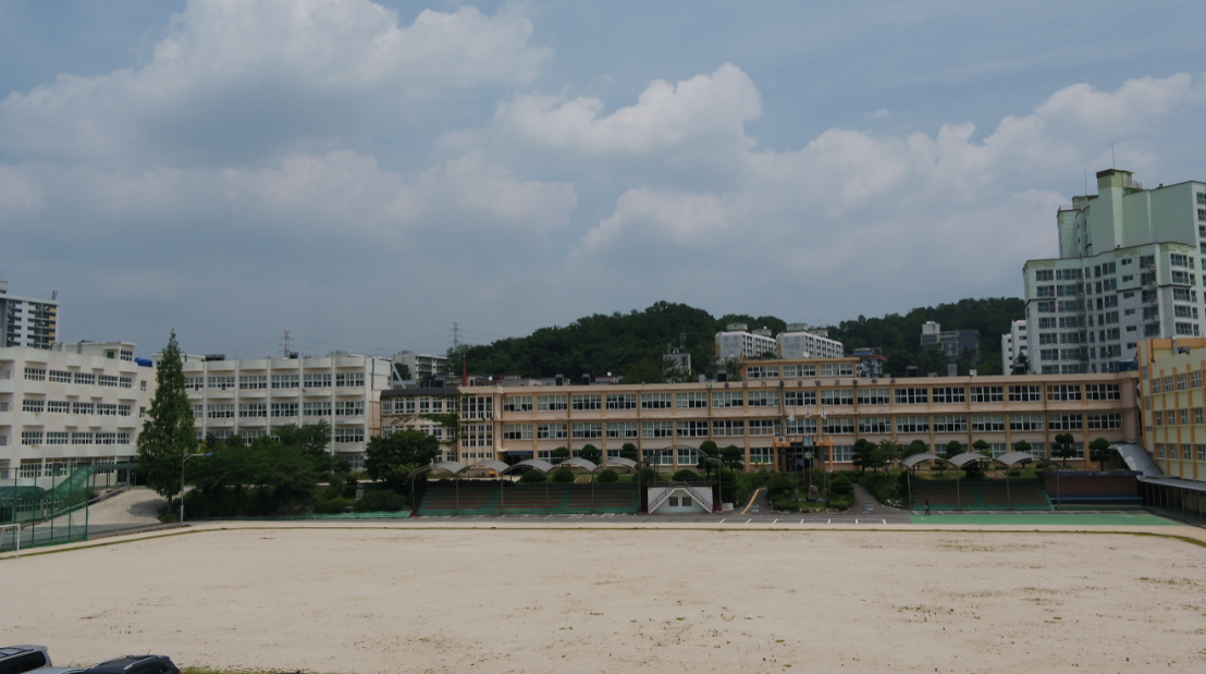 울산기술공업고등학교 전경사진